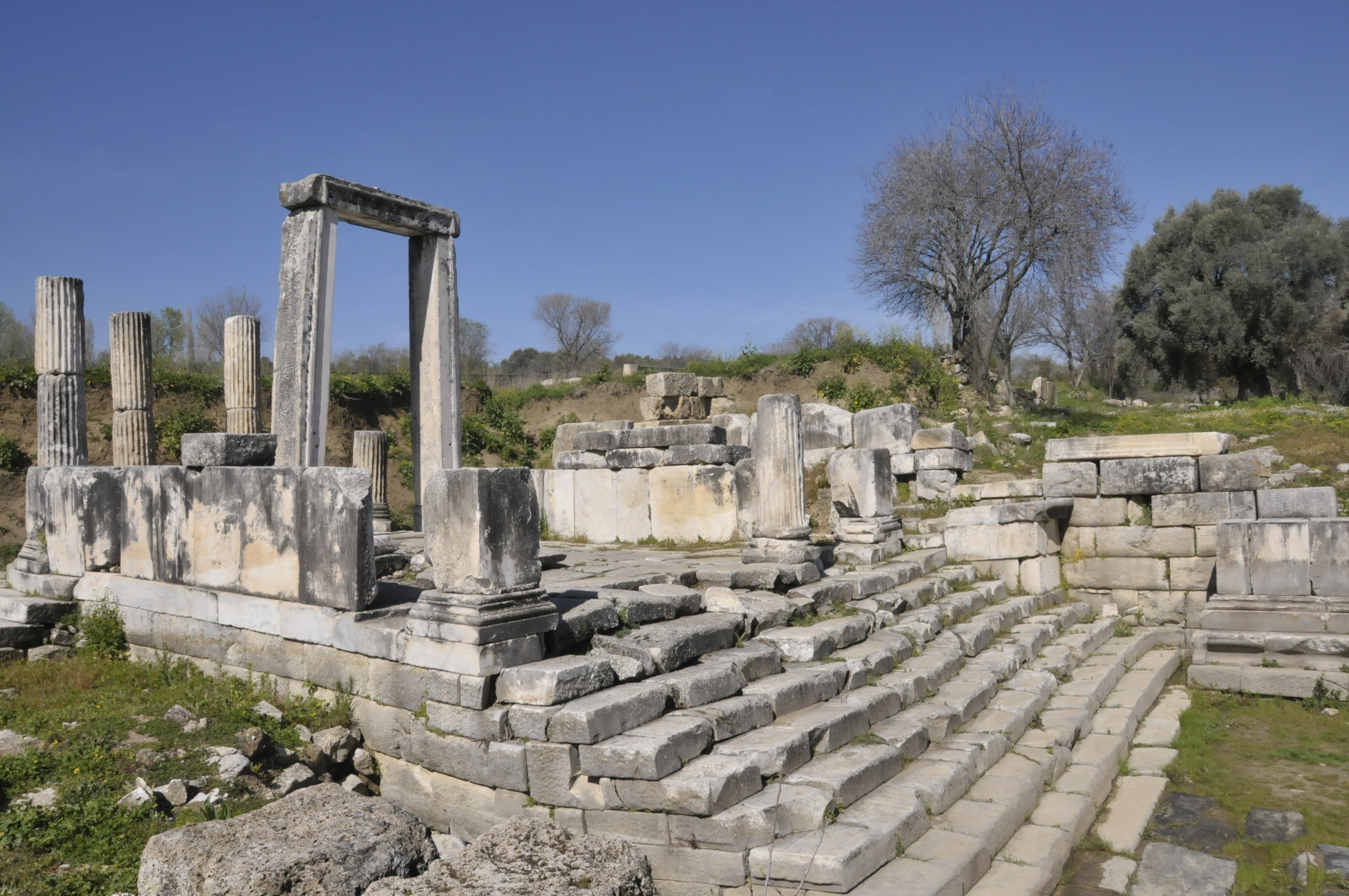 Lagina, Propylon